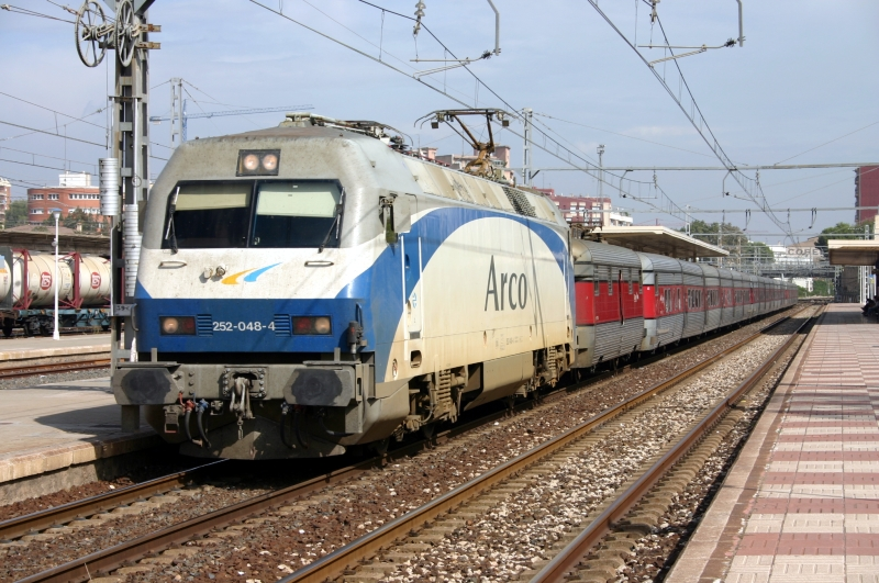 Talgo 530 Miguel de Unamuno during stop at Reus station